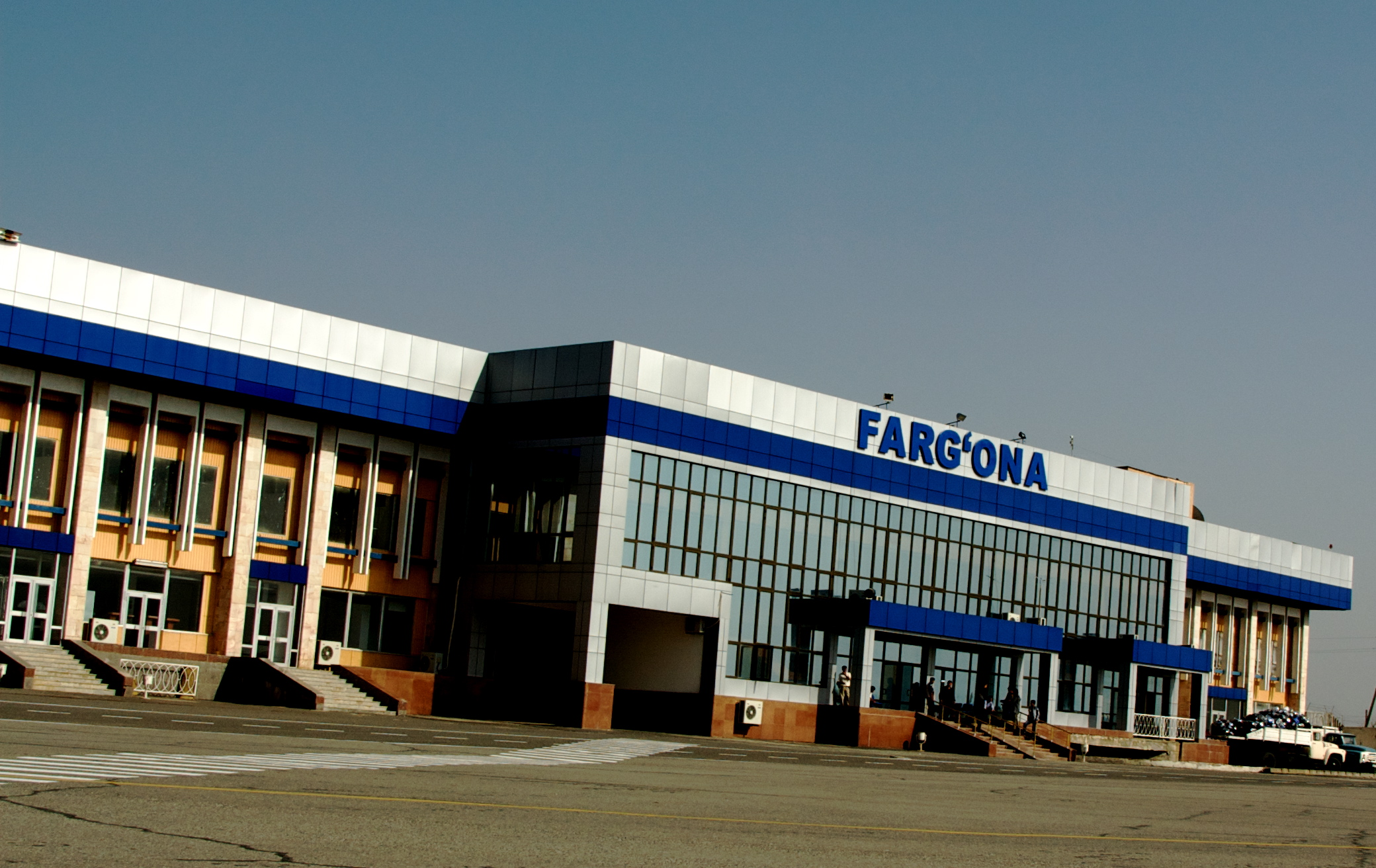 Fergana Airport, Uzbekistan